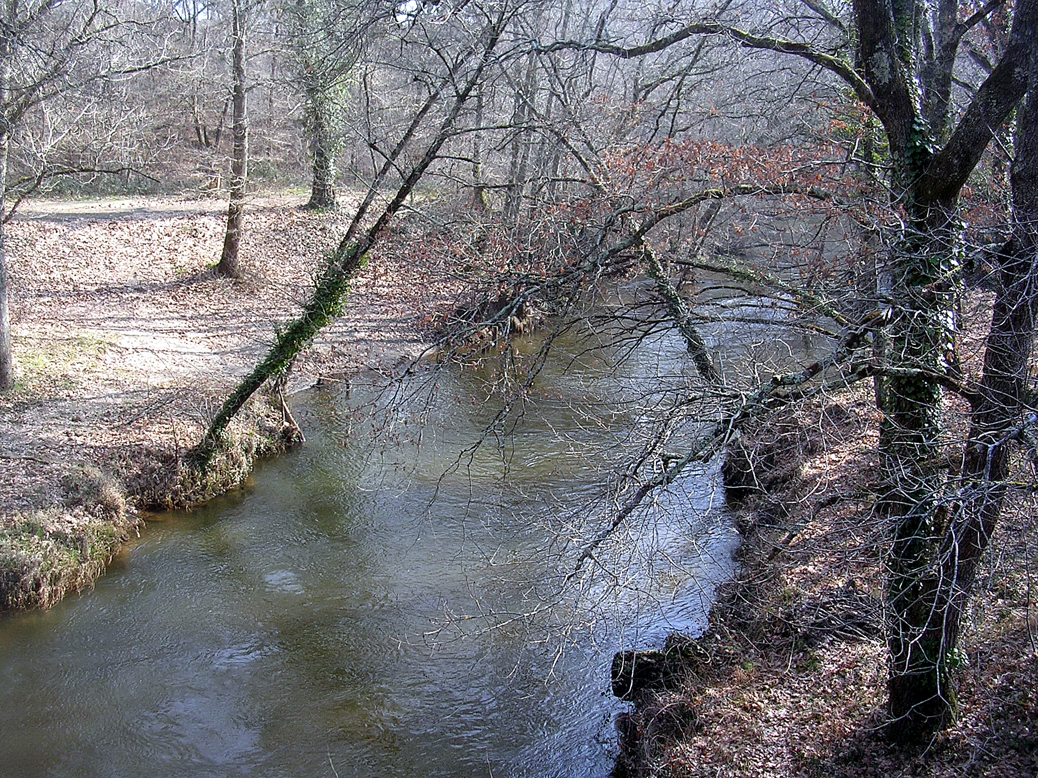 La Grande Leyre à Moustey, dans le département français des Landes.